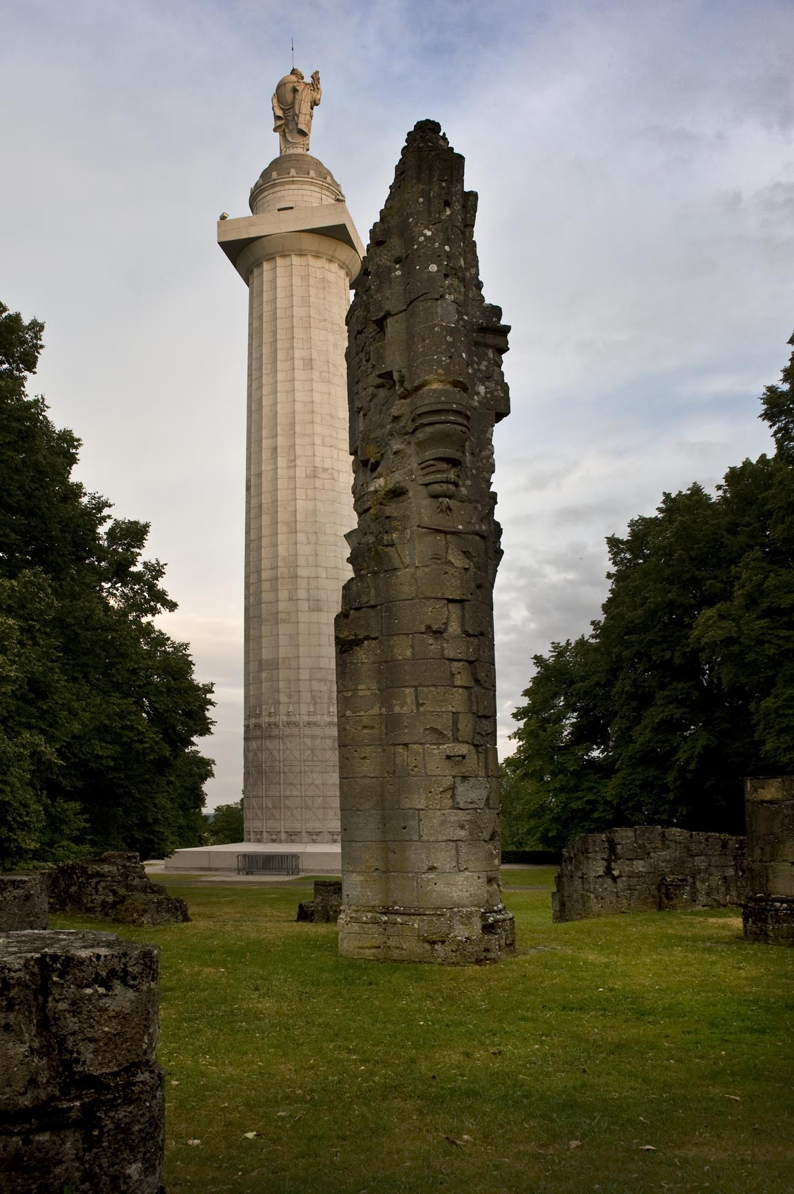 Memorial de Montfaucon, het monument met op de voorgrond de ruïne van de abdijkerk (WO I).